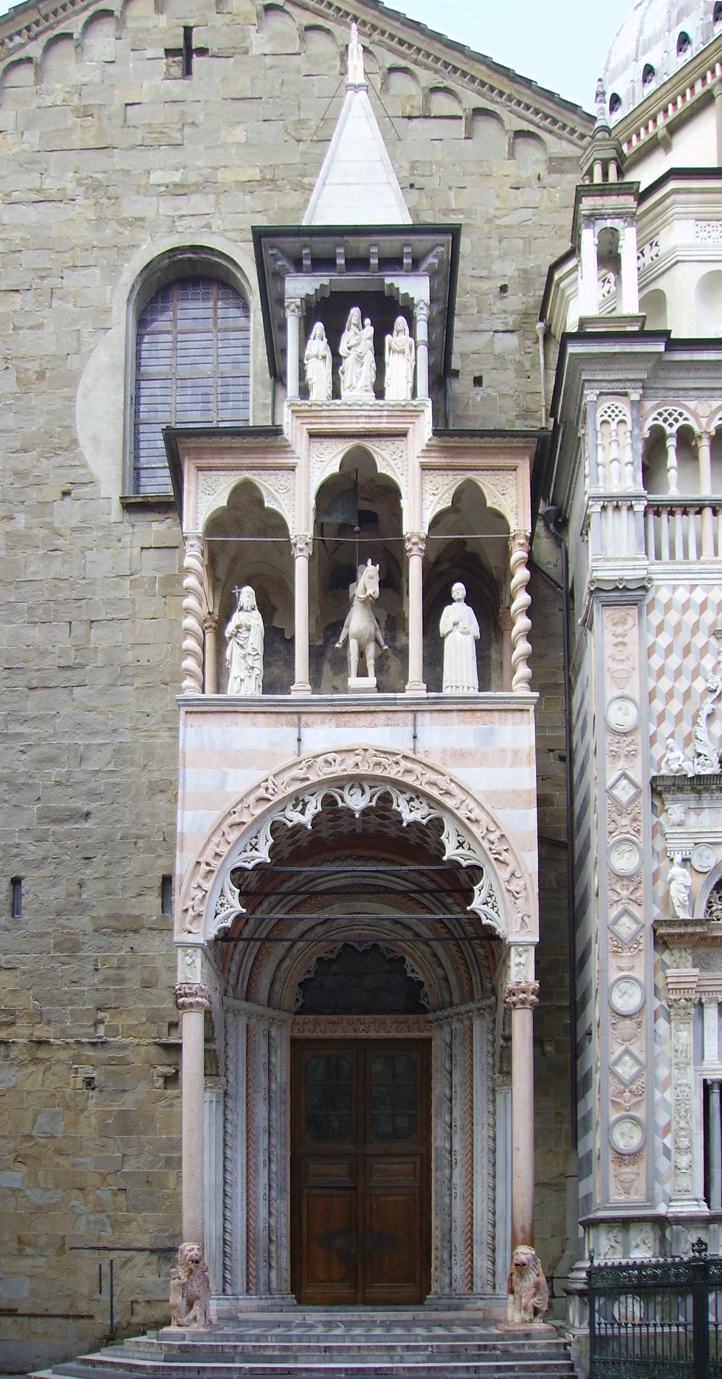 Basilica di Santa Maria Maggiore, Portale Nord, Bergamo